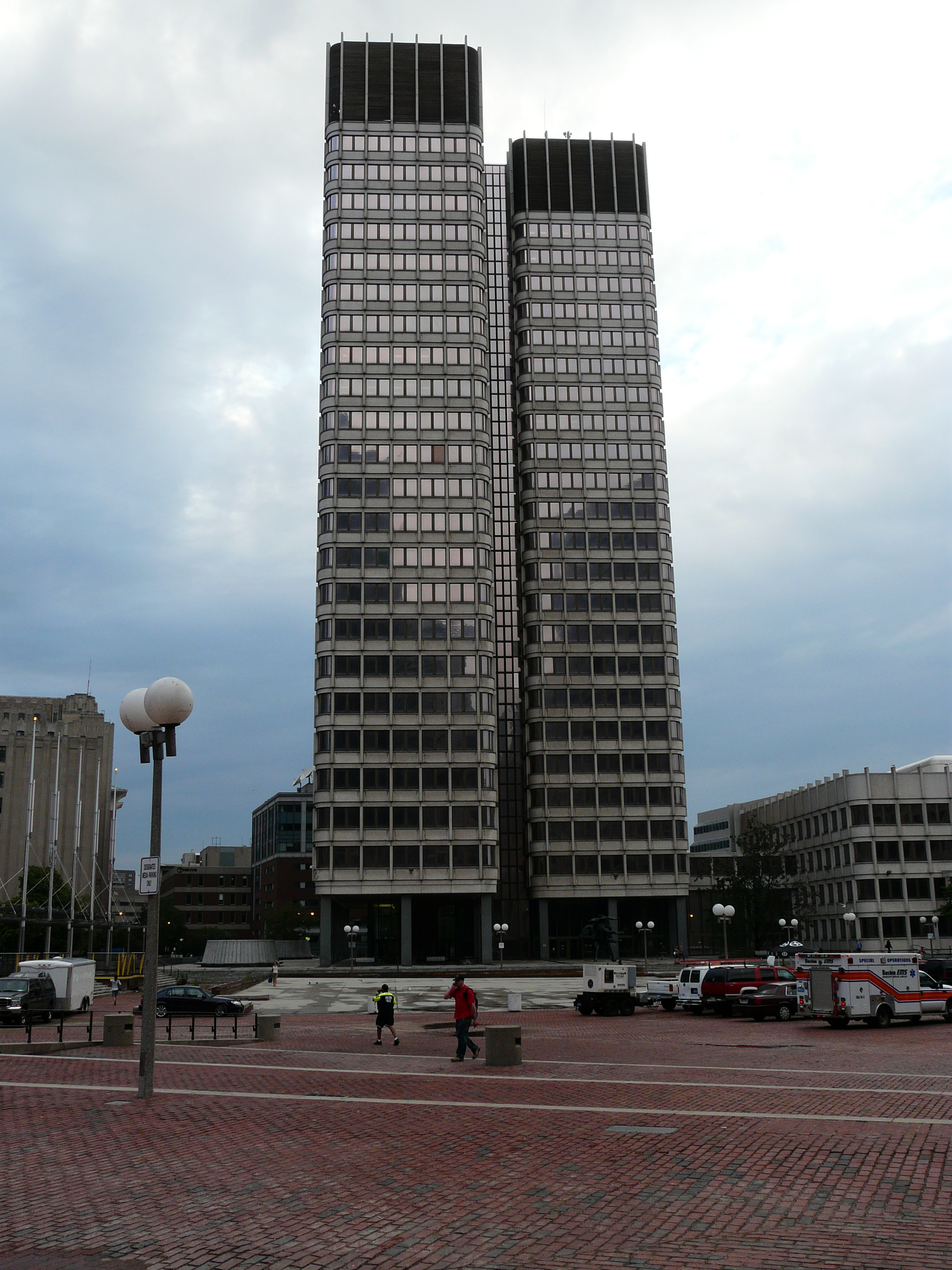 Boston